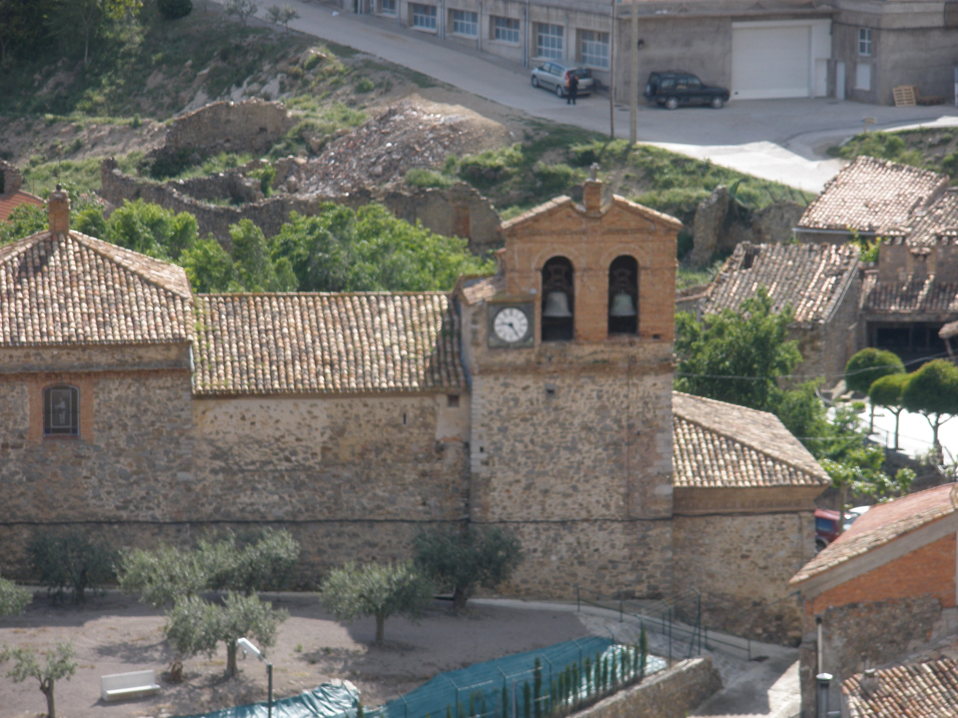 Iglesia de Muro de Aguas, desde lejos.